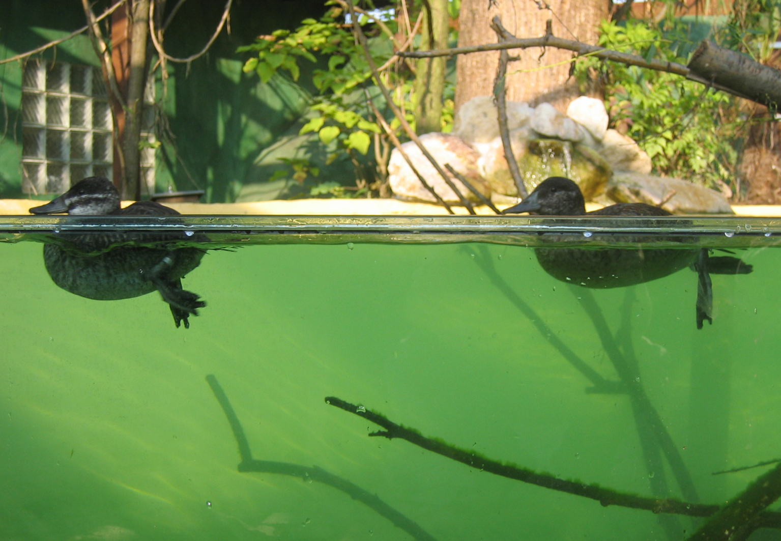 Argentinische Ruderenten im Zoo Heidelberg; eigenes Foto, aufgenommen Oktober 2006 :Kategorie:Entenvögel